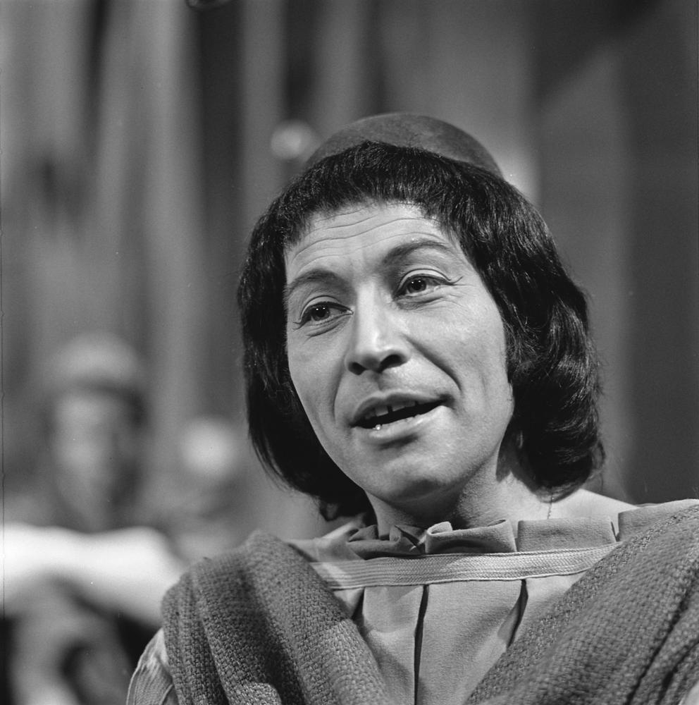 Ad Hoeymans in het televisiespel Herodes als Nicolaos in 1973